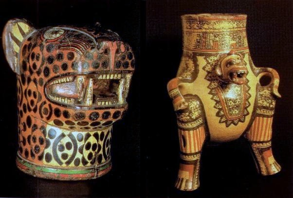 A la izquierda, vasija nicoyana de jaguar deificado. A la derecha, jarra bicolor con motivo de mono (1200-1500 de nuestra era), encontrada en el Valle del Tempisque. Corresponden las imágenes a cerámica propia del periodo precolombino costarricense.